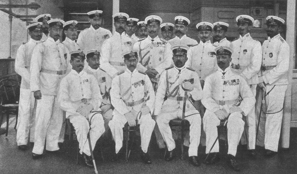 Kaiser Wilhelm II. (1859-1941) mit seinem Gefolge und Offizieren des Schiffs an Bord der SMY Hohenzollern (Stapellauf 1892).